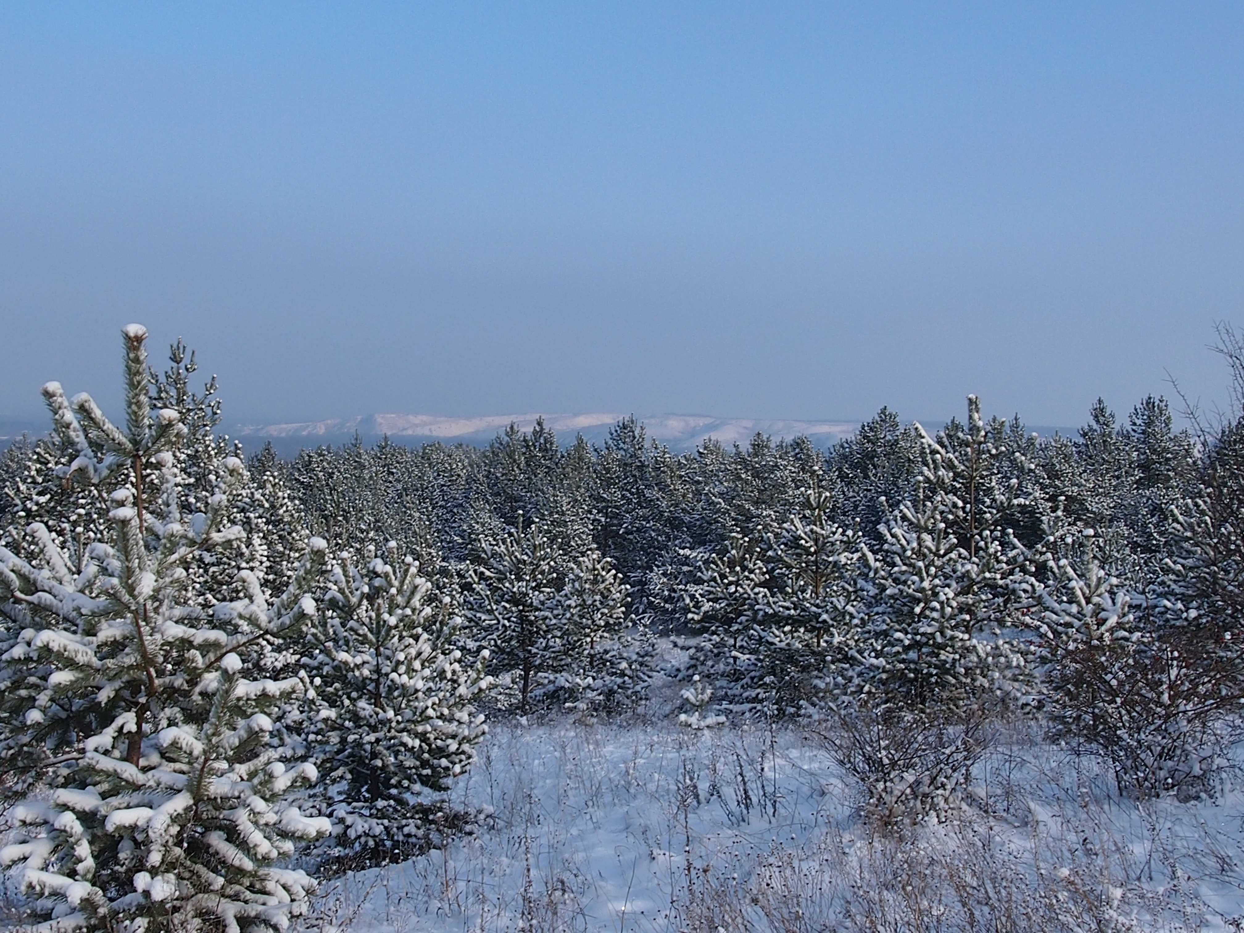 Крейдяна флора, Слов'янський р-н, біля с. Піскунівка, Краснолиманський р-н, біля с. Закітне та с. Крива Лука Слов'янський (634,0 га) та Краснолиманський р-ни (500,0 га)